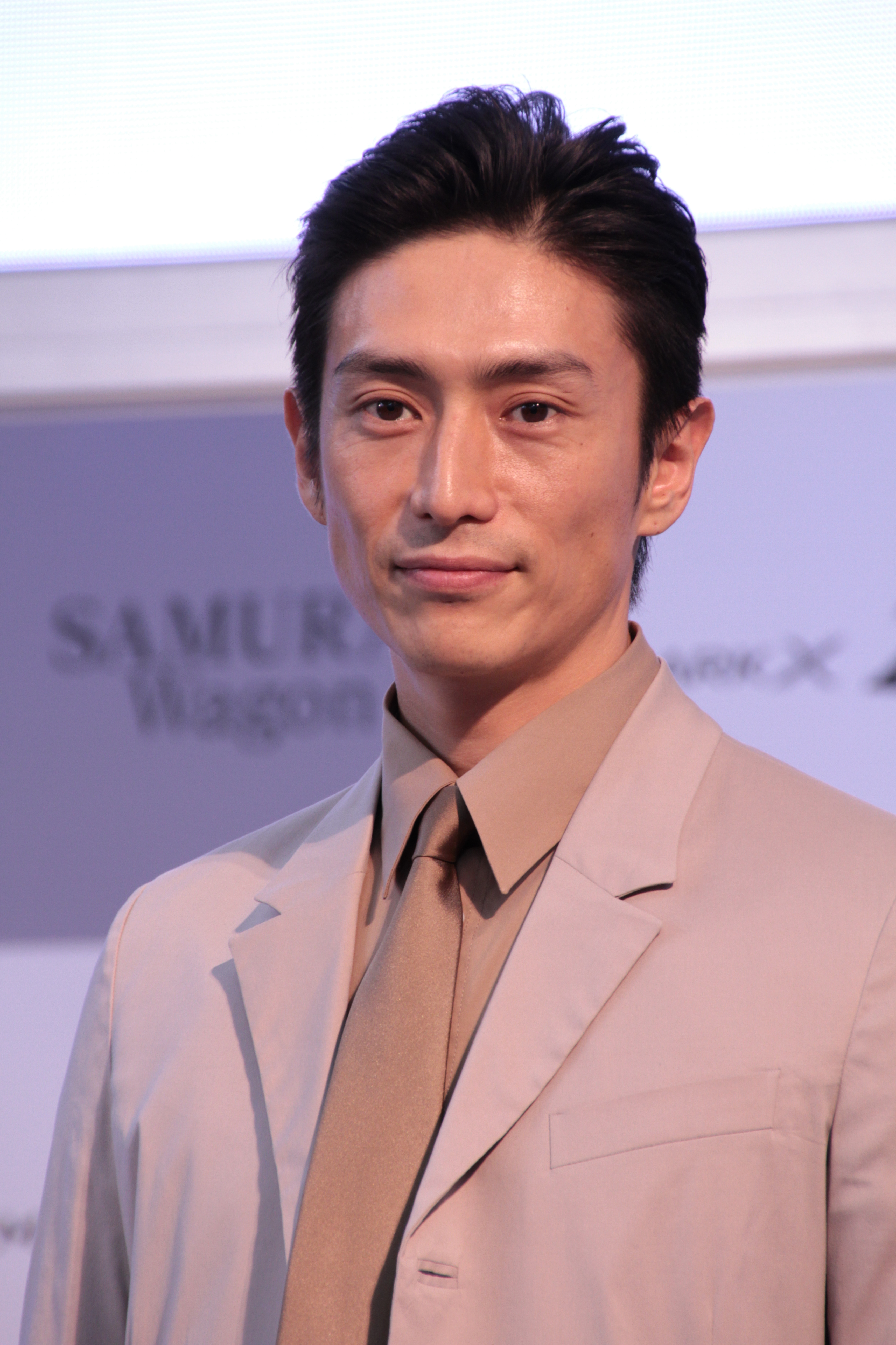 toyota MARK X ZiO 発表会